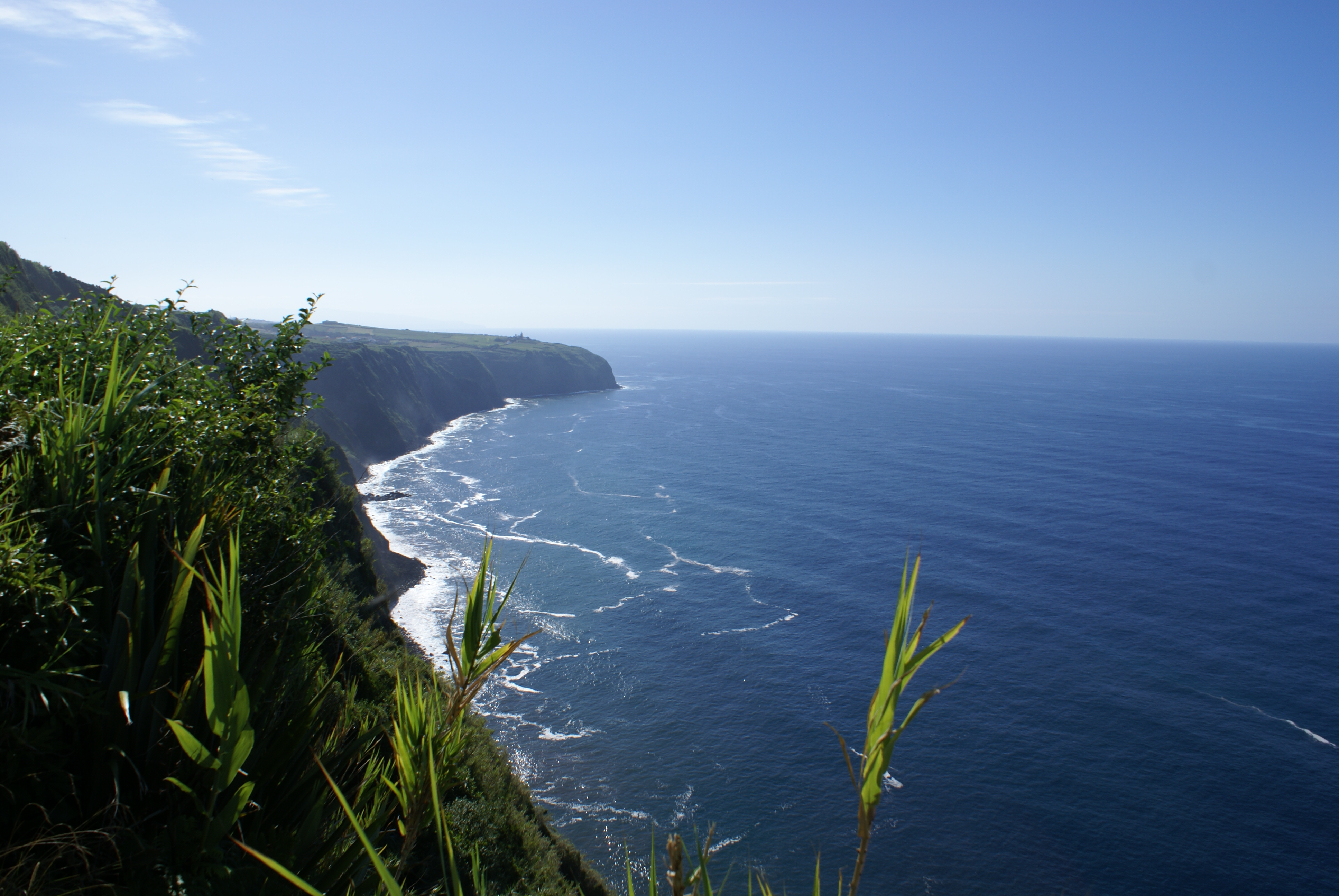 Miradouro Despe-te Que Suas, Nordeste, ilha de São Miguel, Açores